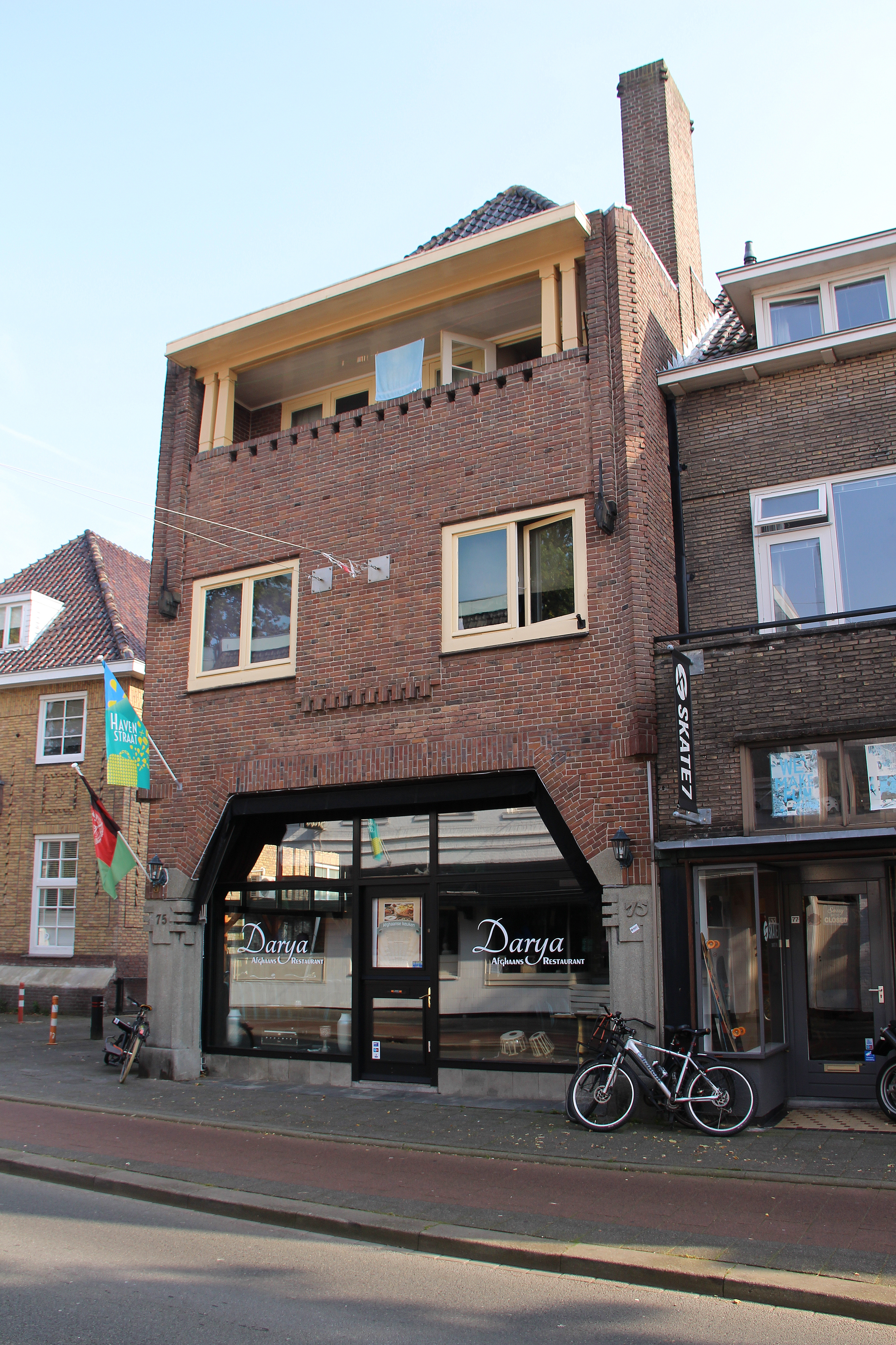 Het winkelhuis met bovenwoning is gebouwd in 1925, in opdracht van de N.V. Albert Heijn te Zaandam. De ontwerper was de architect J. van Laren, die het pand bouwde in een voor de bouwtijd karakteristieke, aan de Amsterdamse (Haagse School) verwante Interbellumstijl. De voormalige kruidenierswinkel maakt deel uit van een gesloten gevelwand aan de Havenstraat.